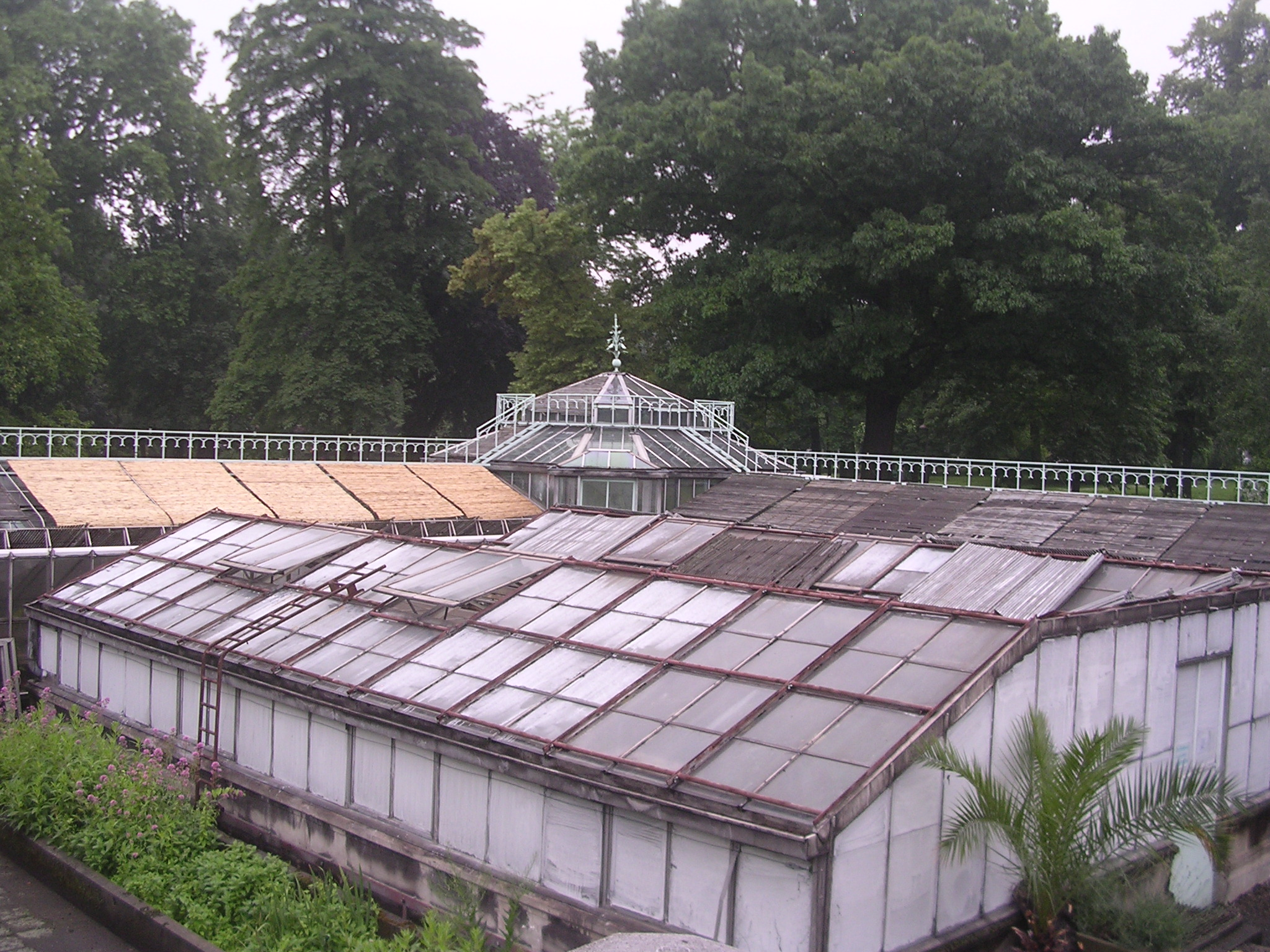 Les serres du jardin botanique - toiture de style victorien